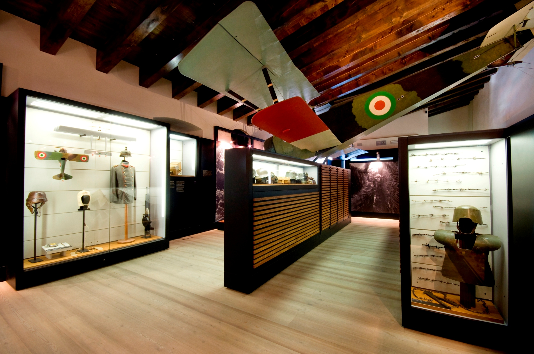 Una delle sale dedicate alla Prima guerra mondiale con un aereo modello Nieuport 10